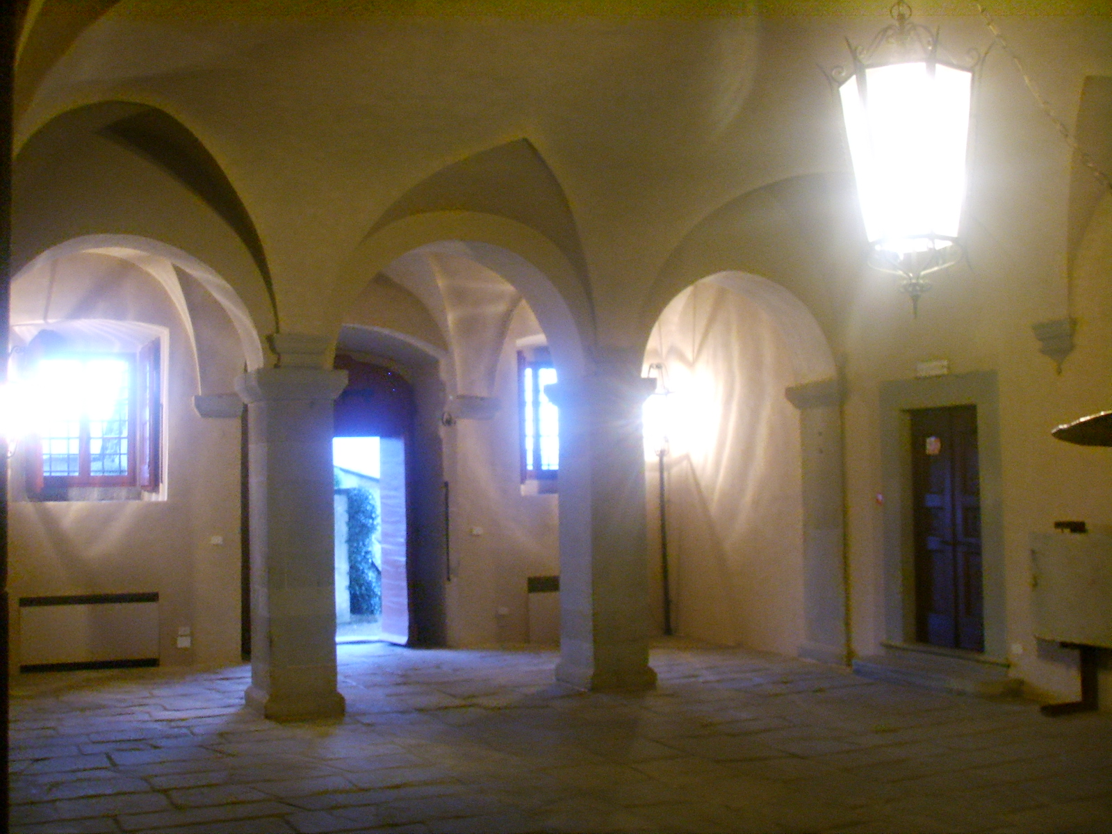 Villa_di_Artimino cortile_delle_carrozze Medici villa in Artimino